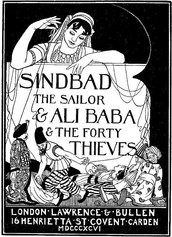 Arabian Nights illustration